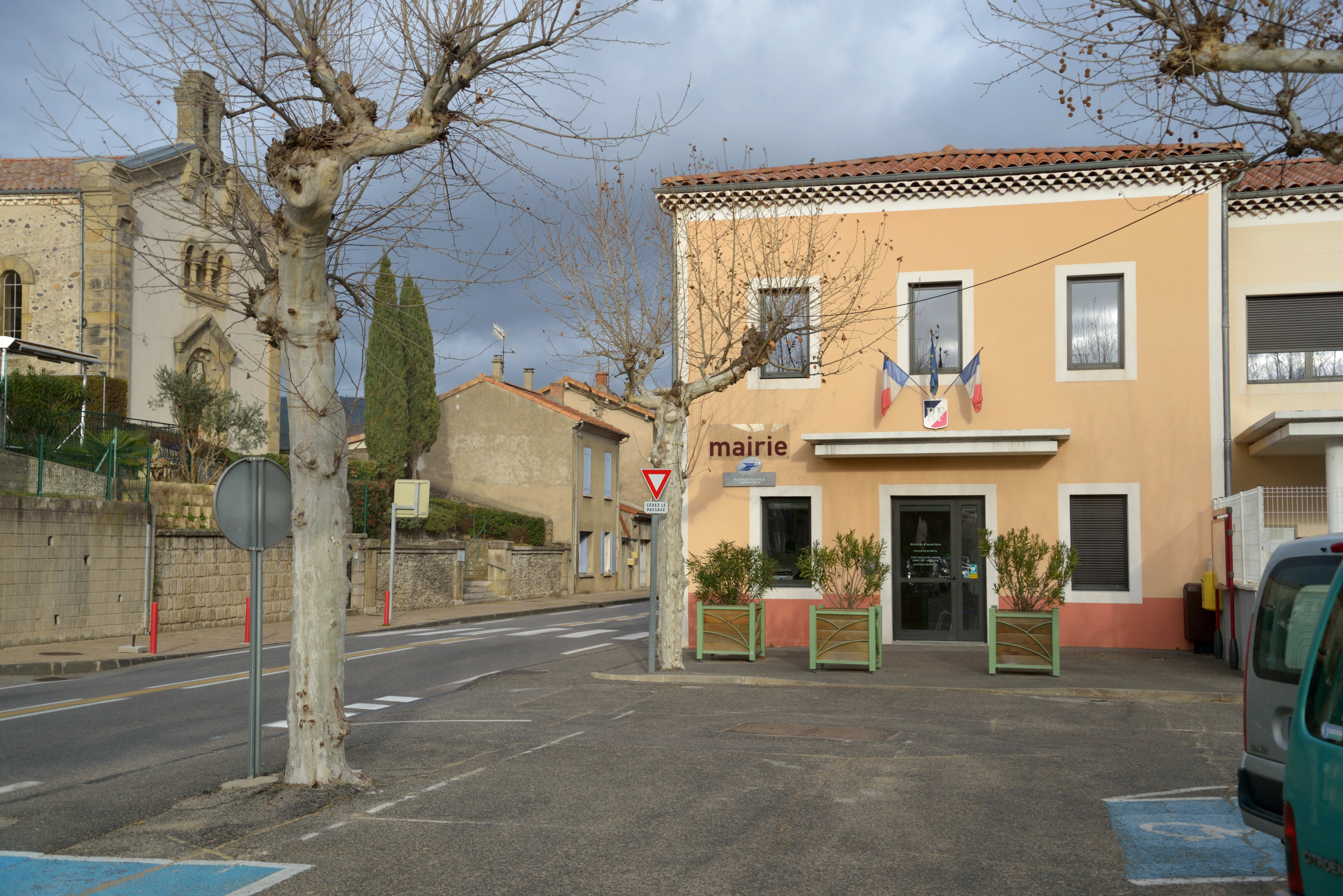 Mairie de Flaviac